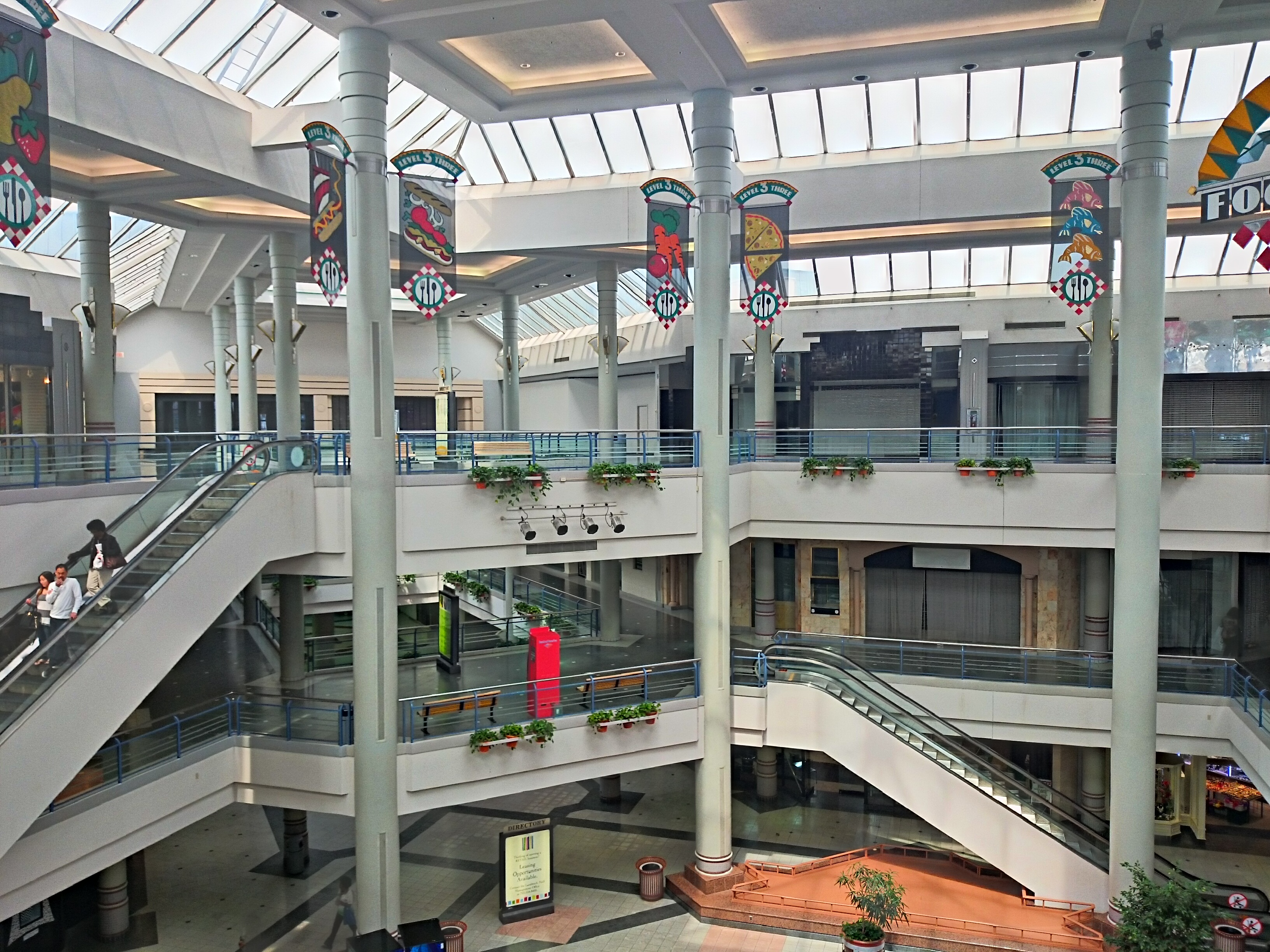 Dead mall: Landmark, Alexandria, Va.